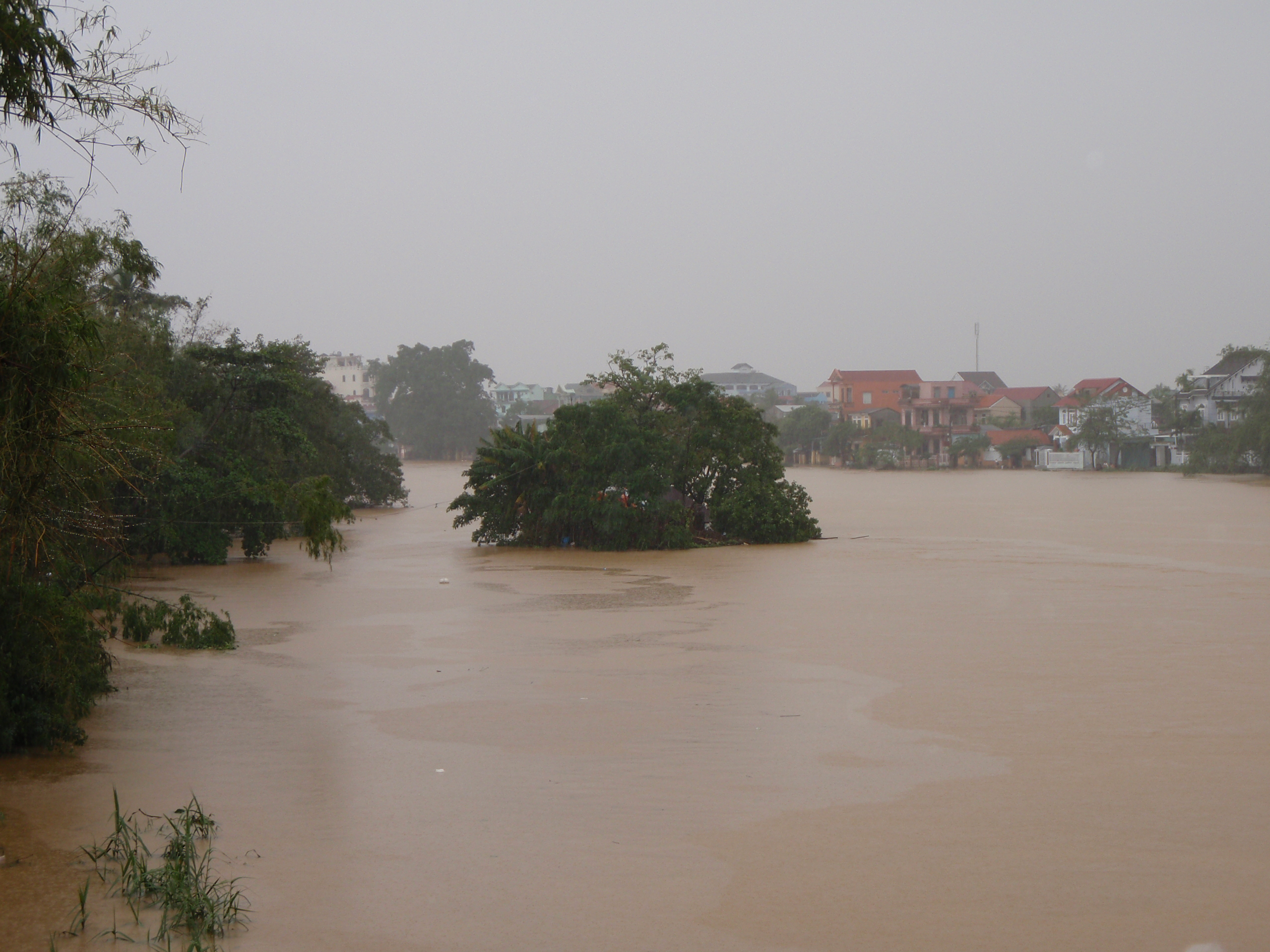 Một ngôi nhà bị cô lập trong lụt do bão Ketsana 2009 tại Huế